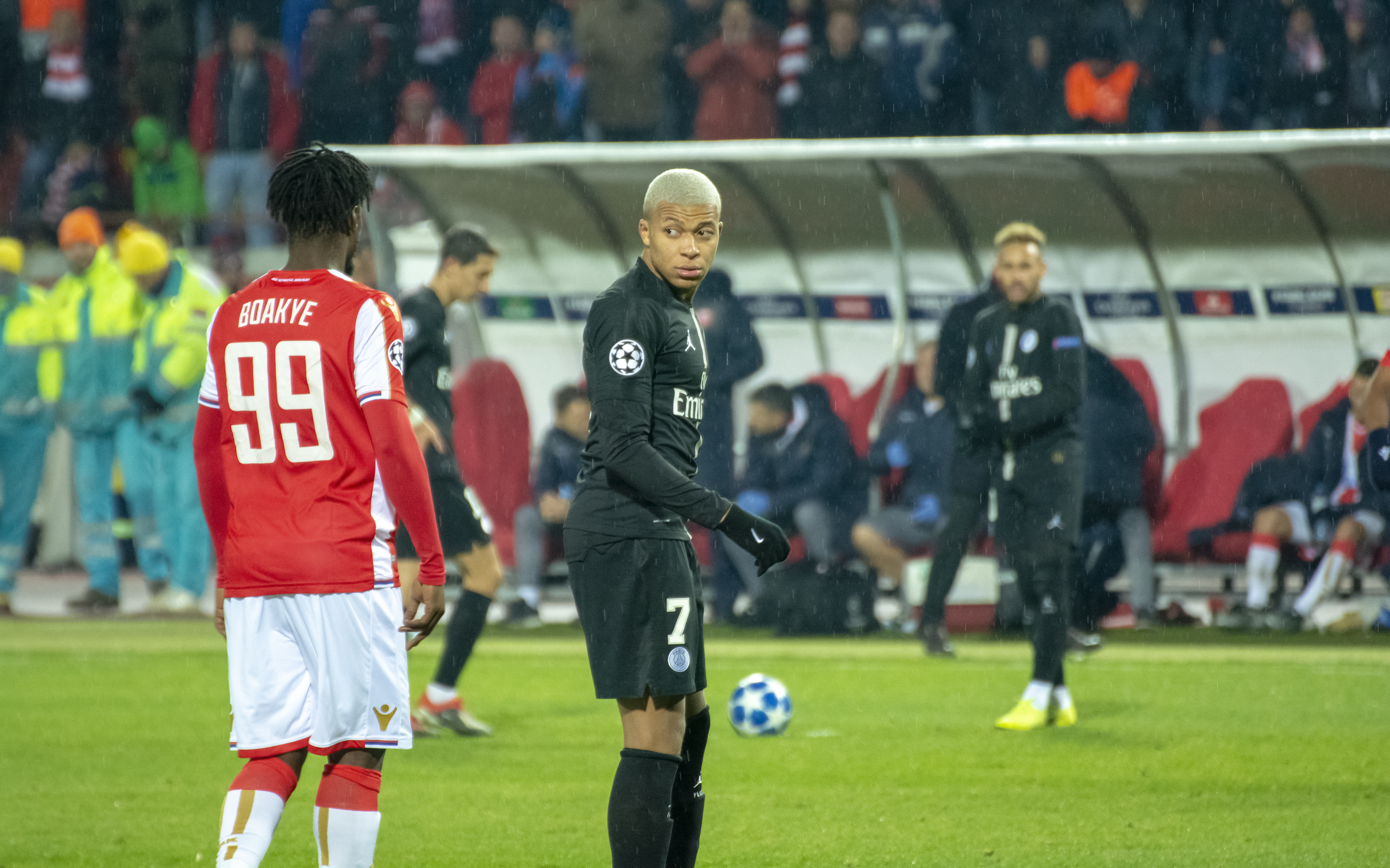 Kylian Mbappé